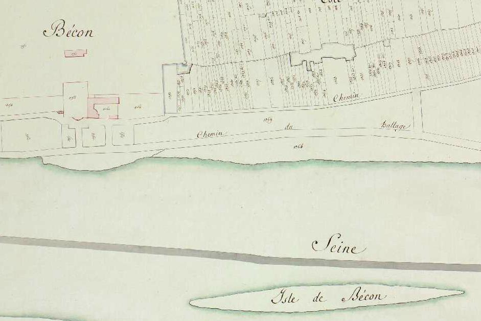 Plans du cadastre, Courbevoie, 1810-1811. Archive et Patrimoine des Hauts-de-Seine. Section D, 2ème feuille, [1810-1811], 1/1250.